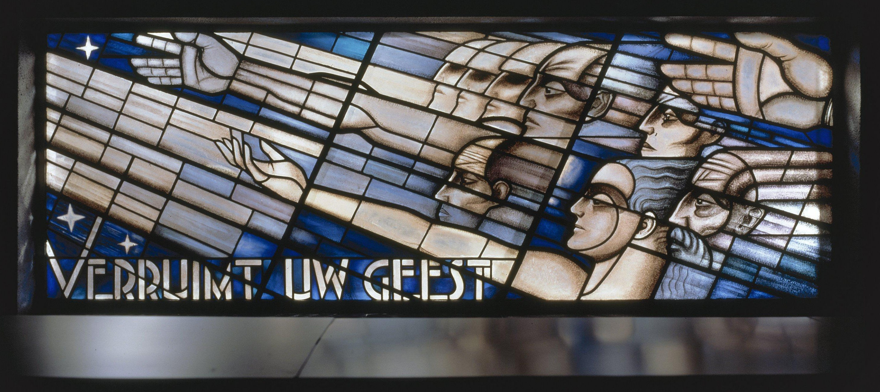 Openbare bibliotheek en Leeszaal: Interieur, aanzicht gebrandschilderd glas-in-loodraam (opmerking: Gefotografeerd voor Glas in lood in Nederland 1817-1968)